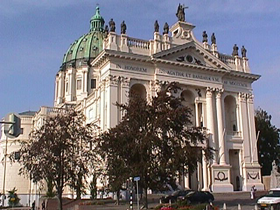 Eigen werk